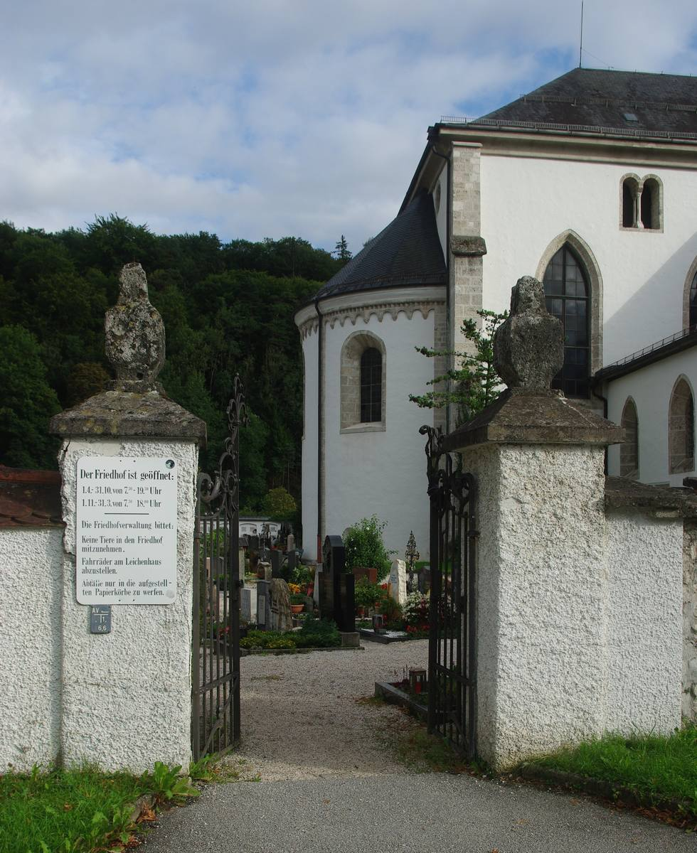 Kleiner Westeingang des Friedhof St. Zeno in 83435 Bad Reichenhall. This is a photograph of an architectural monument.